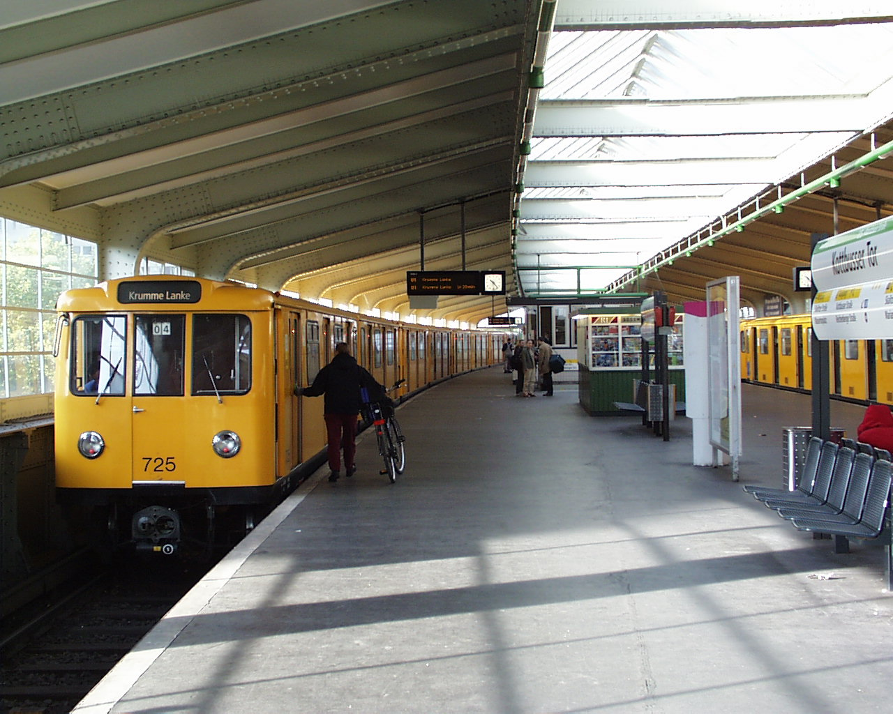 Hochbahnhof Kottbusser Tor in Berlin-Kreuzberg.